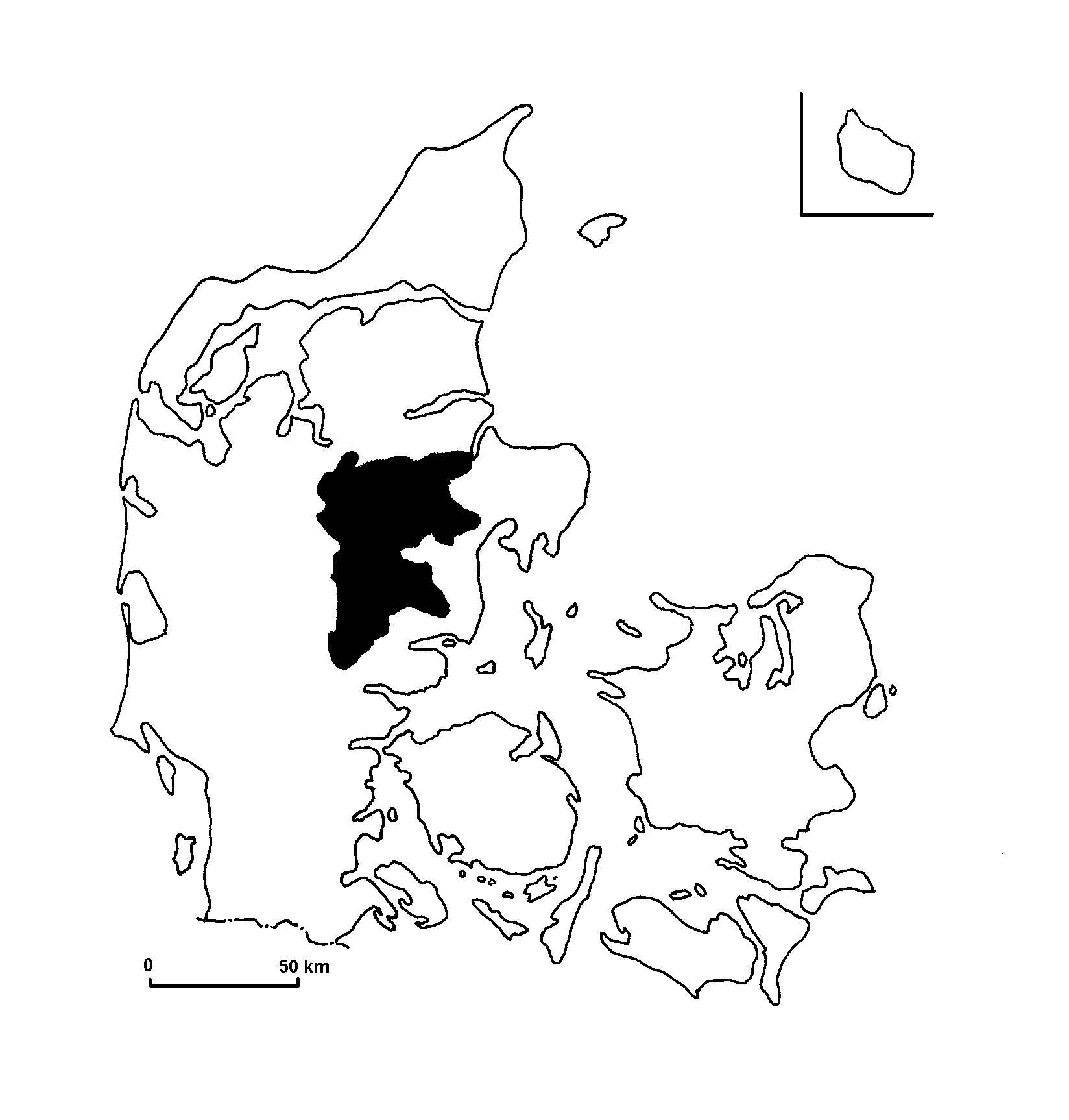 Tilsigsfelt, afvandingsareal, dorzecze, drainage basin, Einzugsgebiet, Avrinningsområde, Gudenå, Guden å, Gudenaa